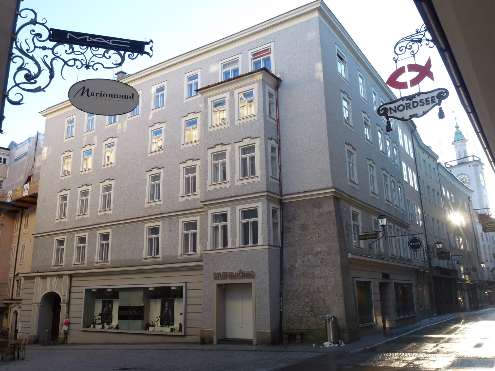 Bürgerhaus, Mühlsteigerhaus, Ramsauerhaus